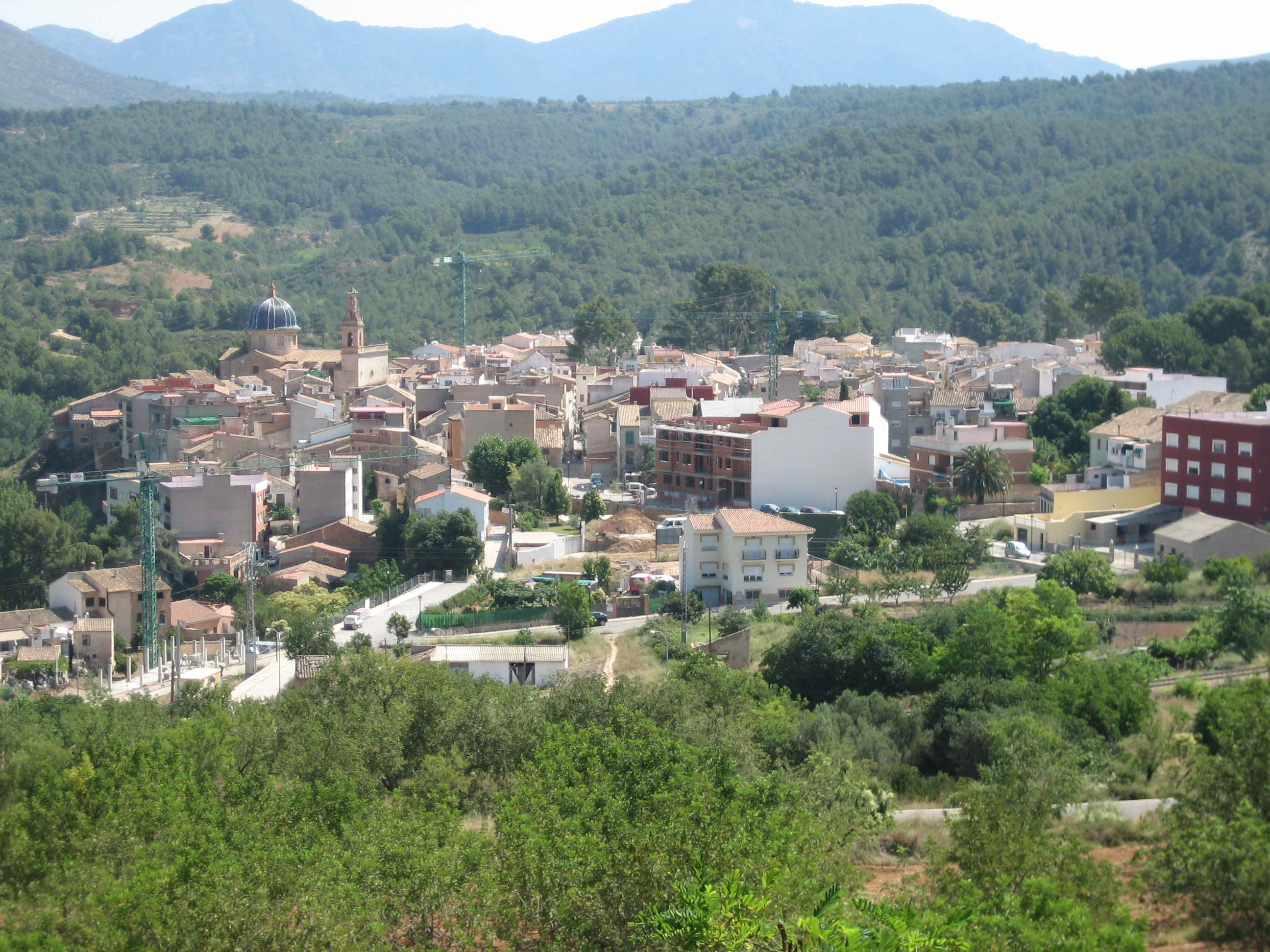 Vista del paese.